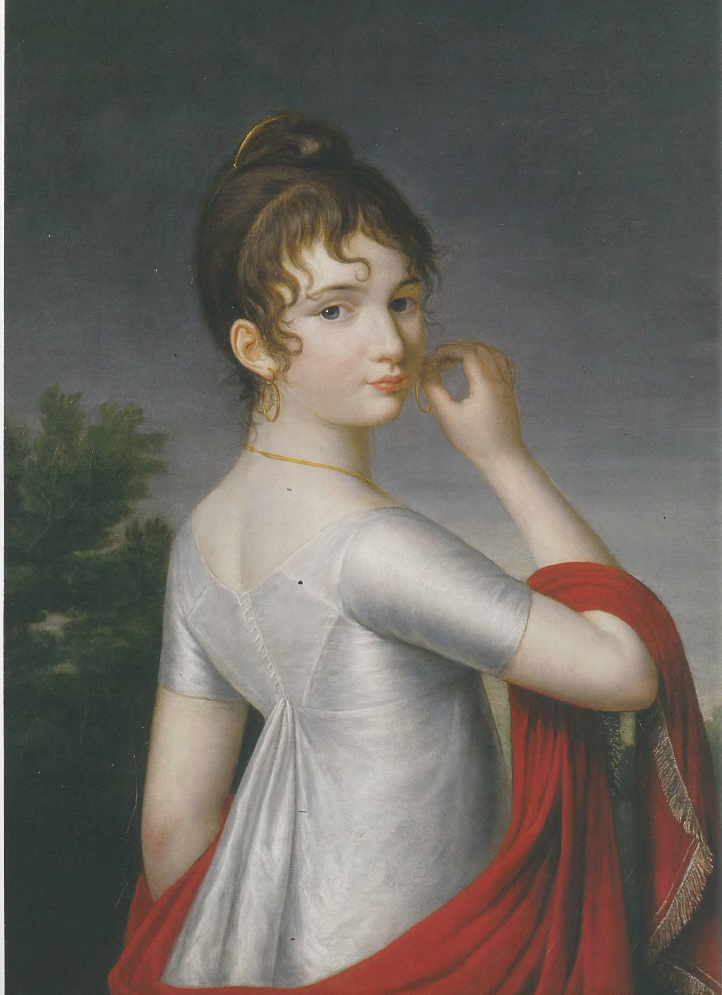 Екатерина Васильевна Долгорукова,в замужестве княгиня Салтыкова (1791-1863), фрейлина, статс-дама.